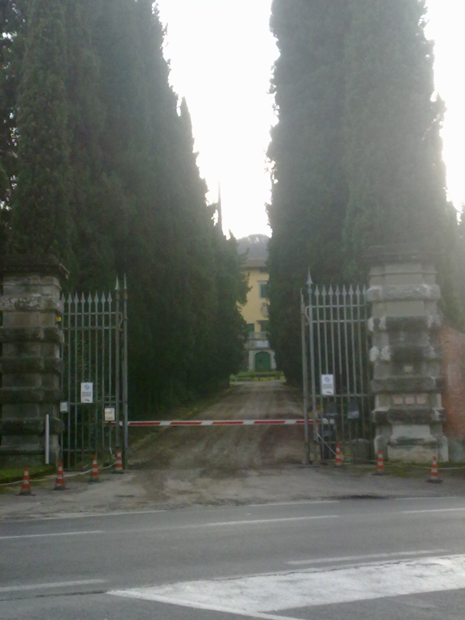 Ingresso di Villa Pandolfini